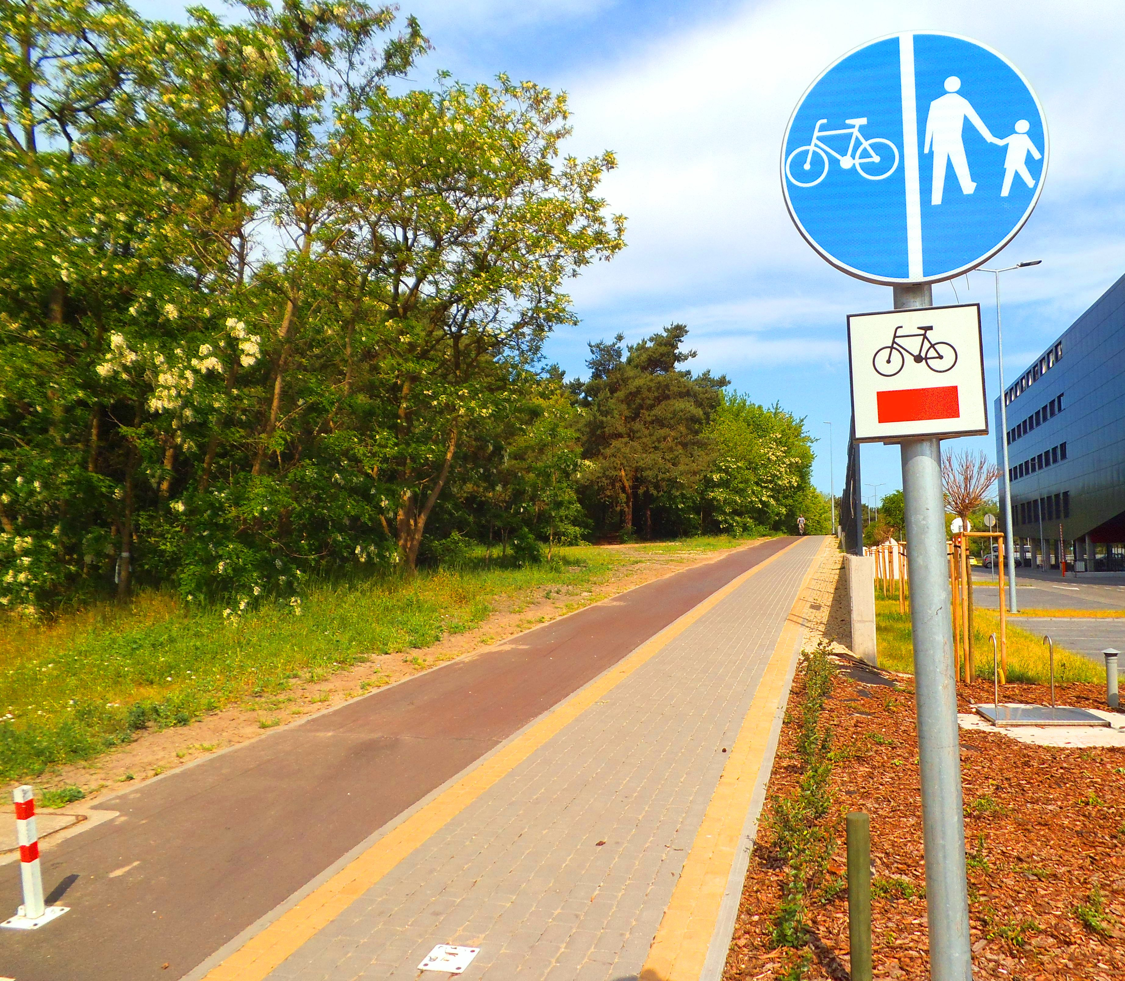 Trakt pieszo - rowerowy łączący ul. Bema z ul. Balonową w Toruniu